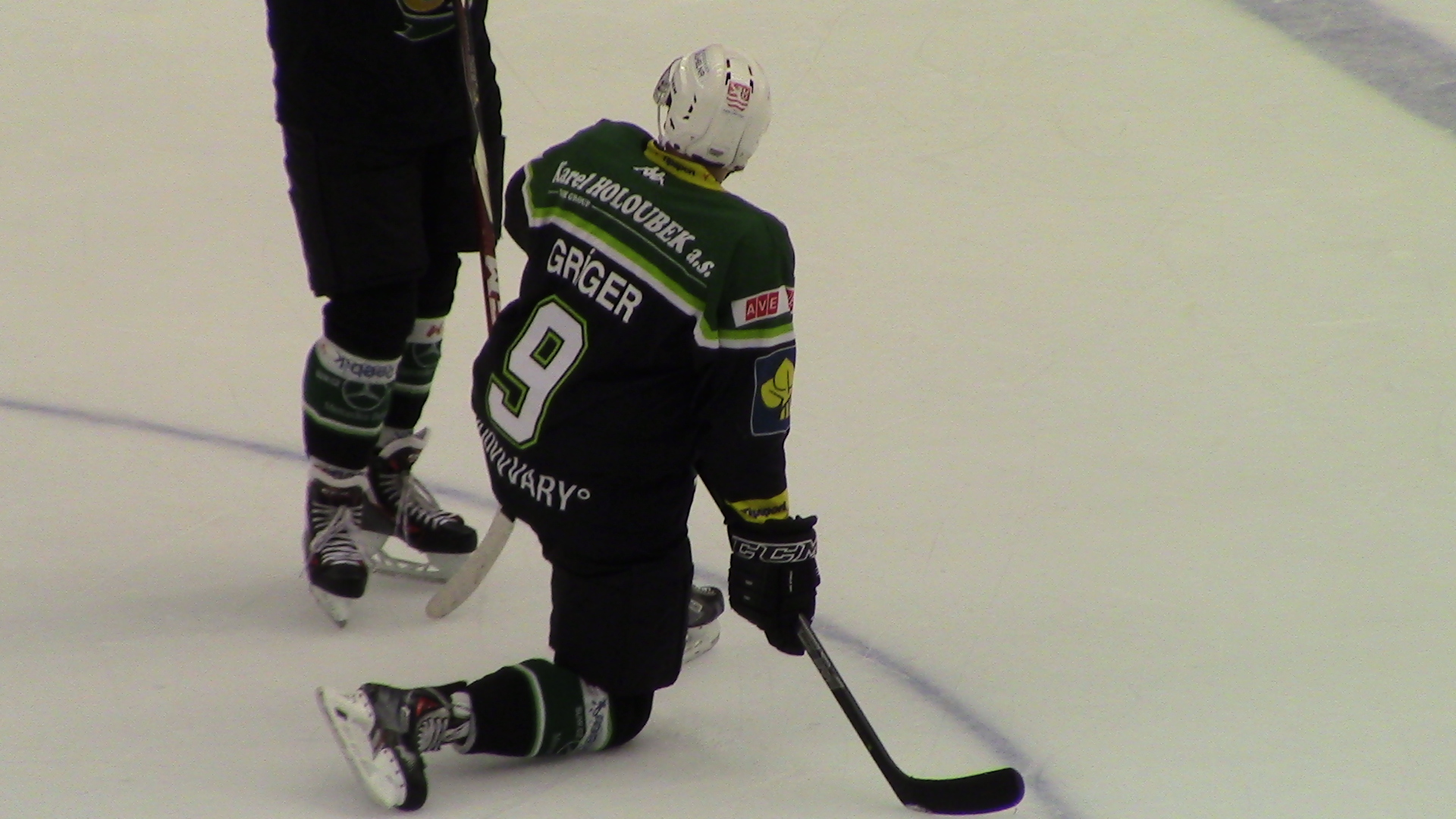 David Gríger